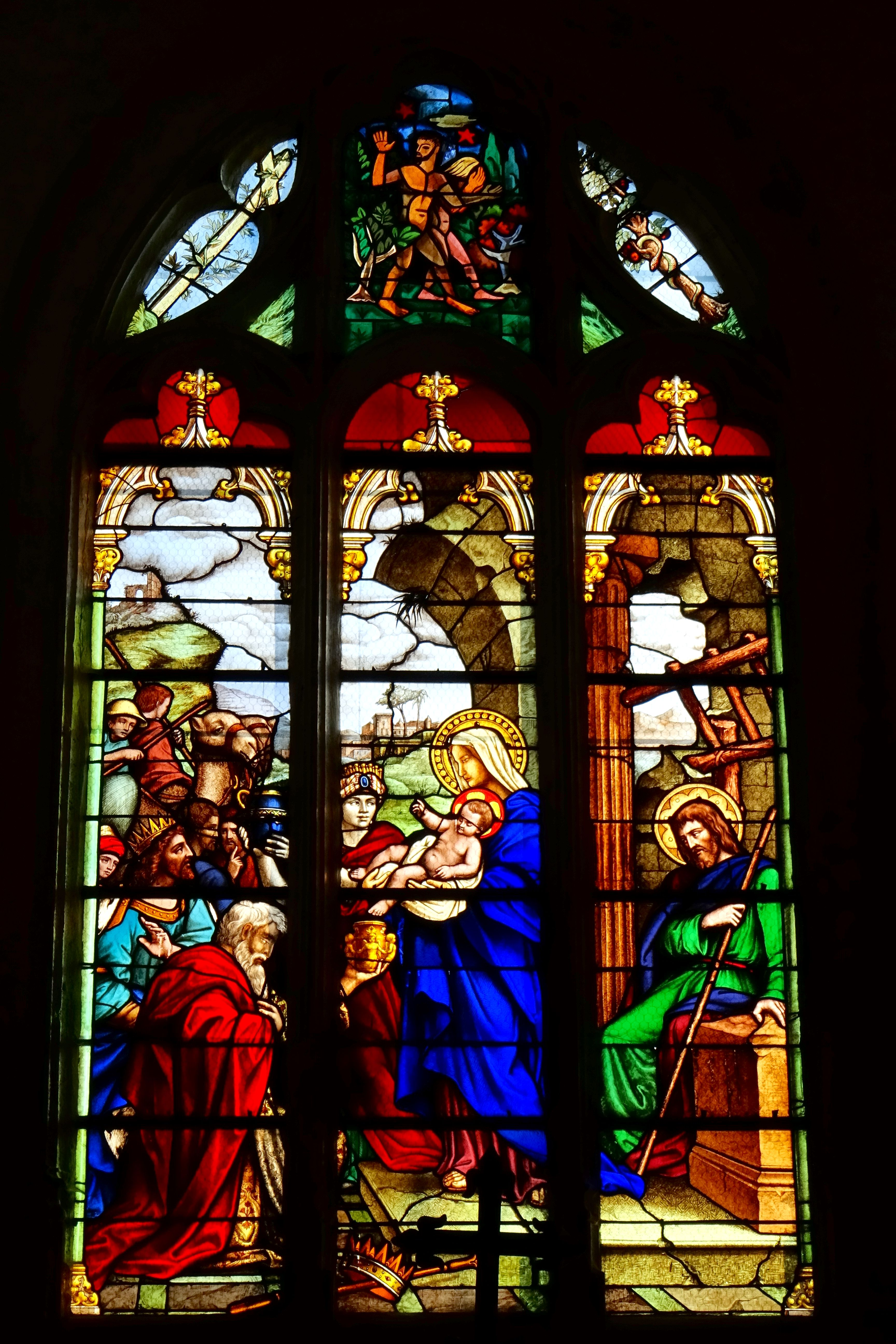 Chapelle latérale sud, première travée, verrière n° 10 - l'Adoration des Mages, par Joseph-Dieu Ména, Ménilmontant, 1868.